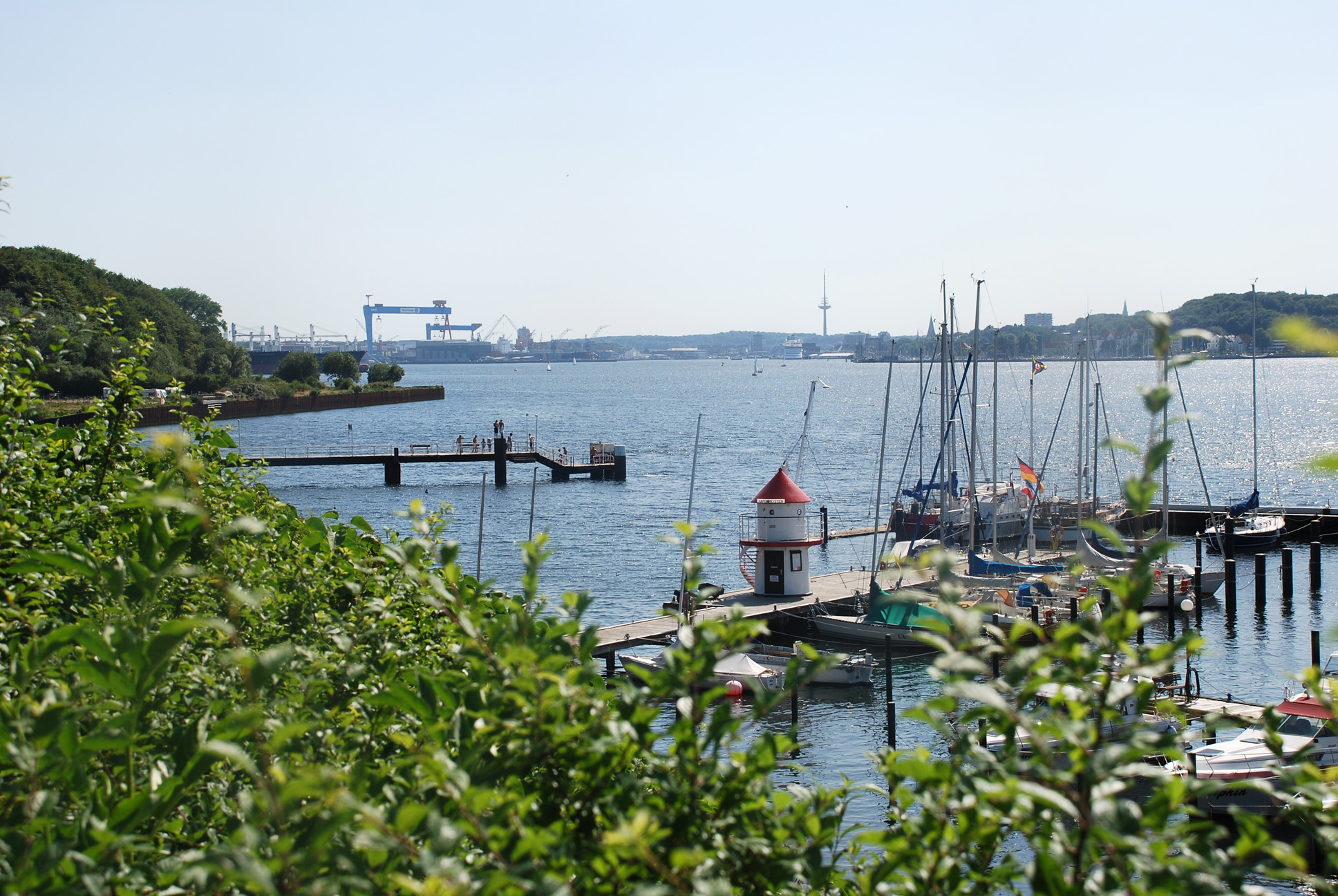 Blick von der Germaniakoppel auf den Hafen von Mönkeberg und auf die südliche Kieler Förde. Rechts hinten das Westufer mit der Altstadt von Kiel, links im Hintergrund HDW (Howaldtswerke-Deutsche Werft) mit den zwei Portalkränen